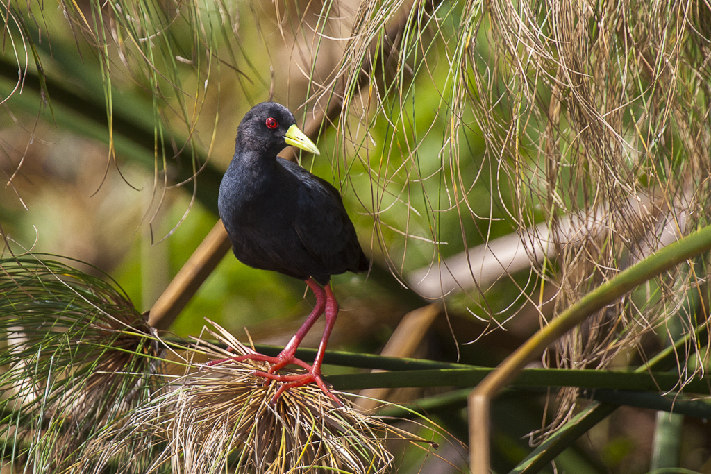 Black Crake - Uganda_H8O2270